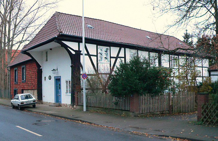 Alte Wache von Schloss Salzdahlum